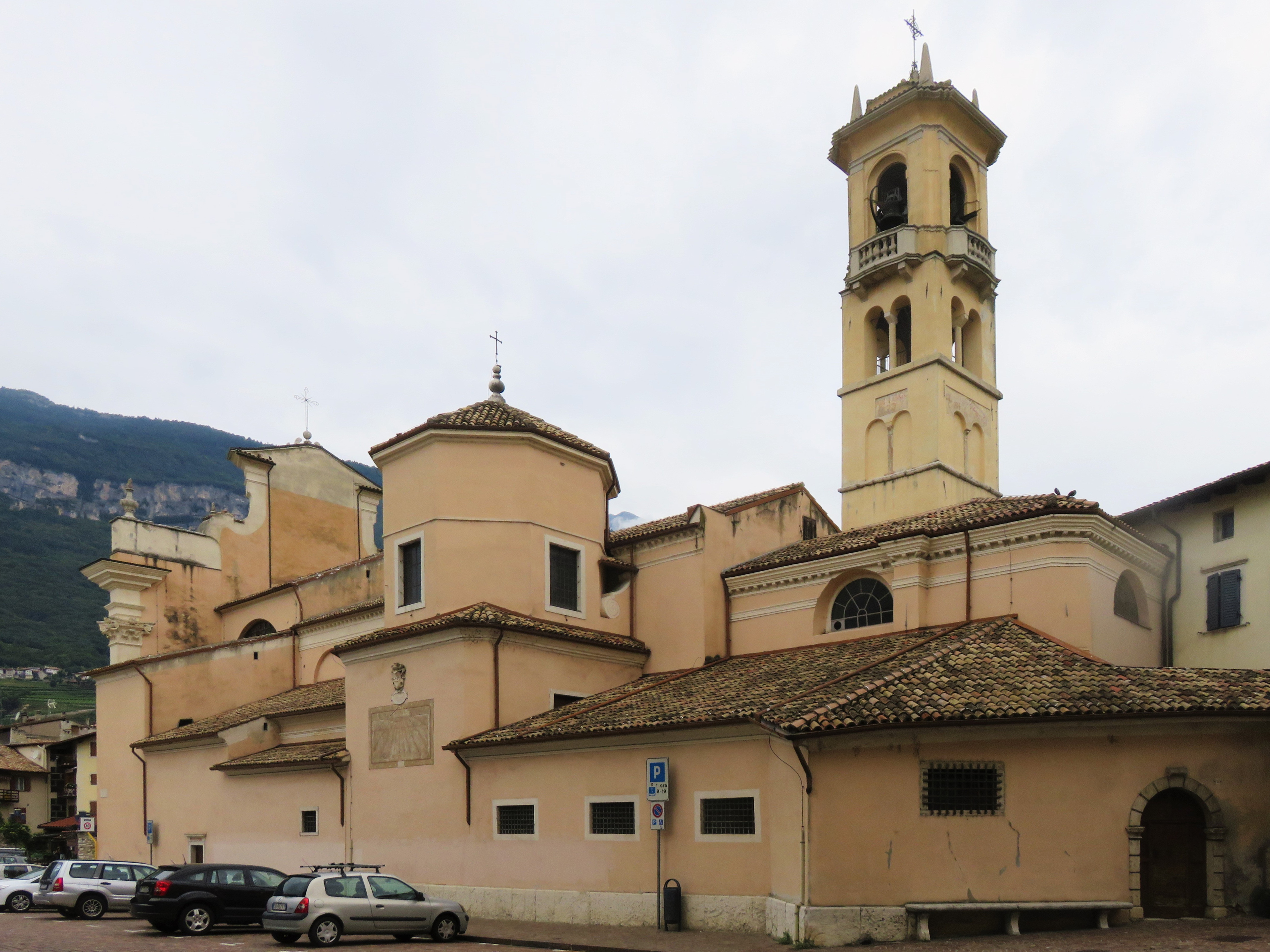 Chiesa di San Giovanni Battista, lato sud su viale Vittoria